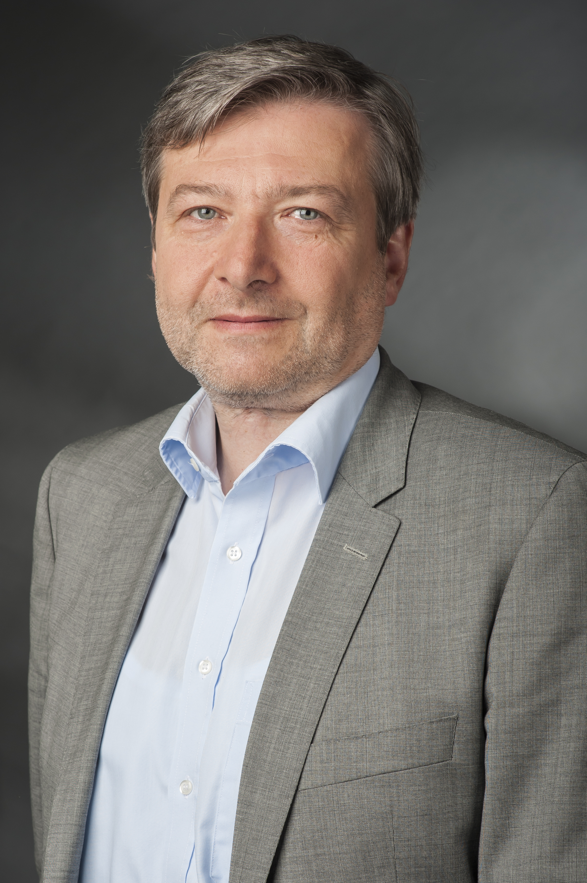 Dirk Heidenblut (* 21. April 1961 in Essen) ist ein deutscher Politiker (SPD) und Abgeordneter im 18. Deutschen Bundestag.